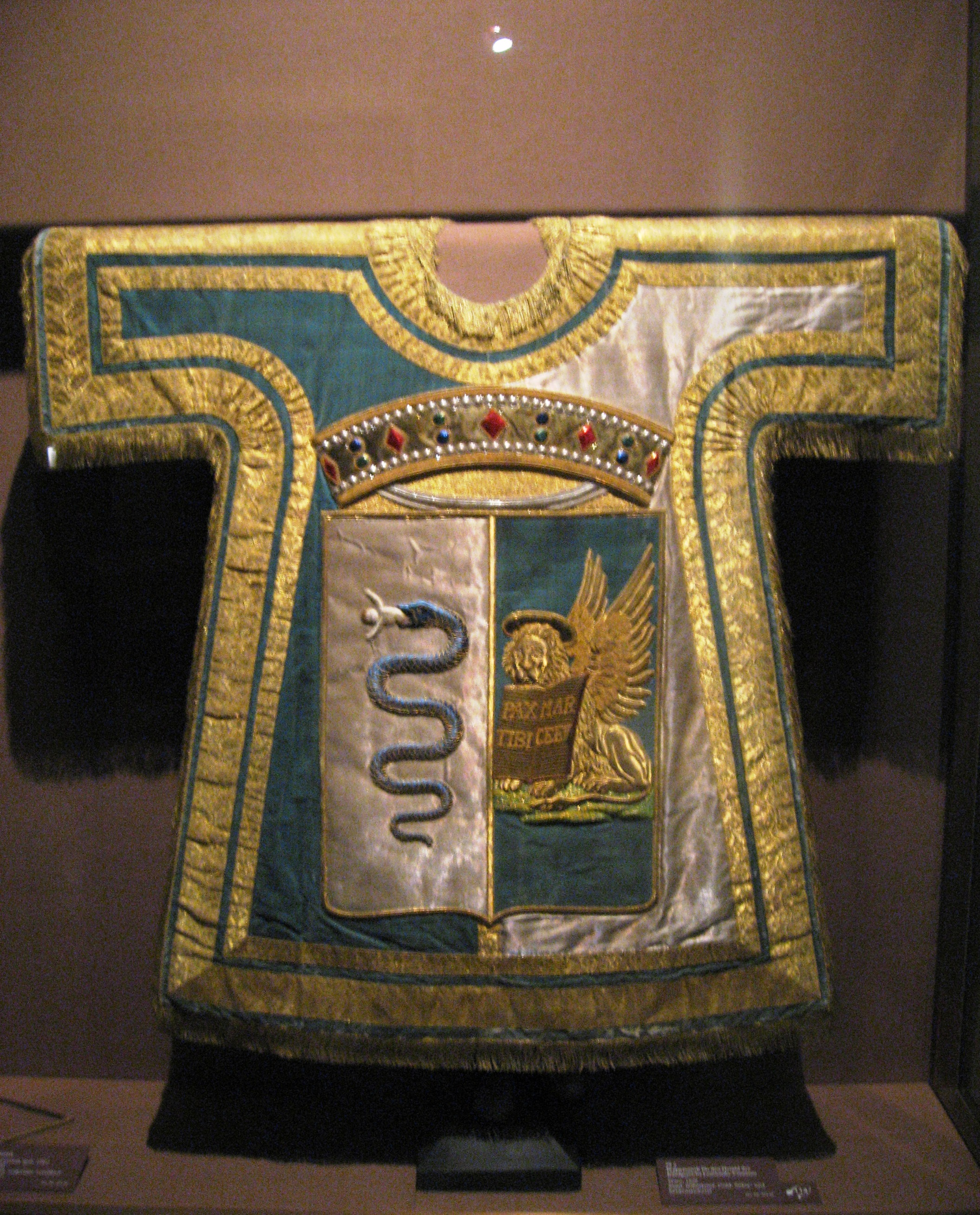 Wappenrock für den Herold des Königreichs Lombardo-Venezien. Wien, 1838. Samt, Silberlamé, Gold, Silberstickerei. Inv. Nr. XIV ?